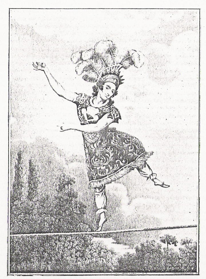 Mme Saqui, gravure extraite de Paul Ginisty, Mémoires d'une danseuse de corde, Paris, 1907. Coll. privée.